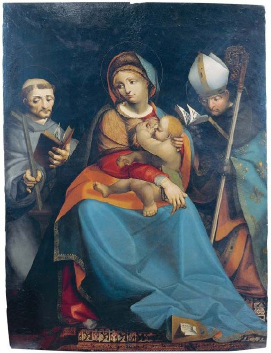 Pietro Grammorseo Madonna e Santi - Vercelli - Palazzo Arcivescovile